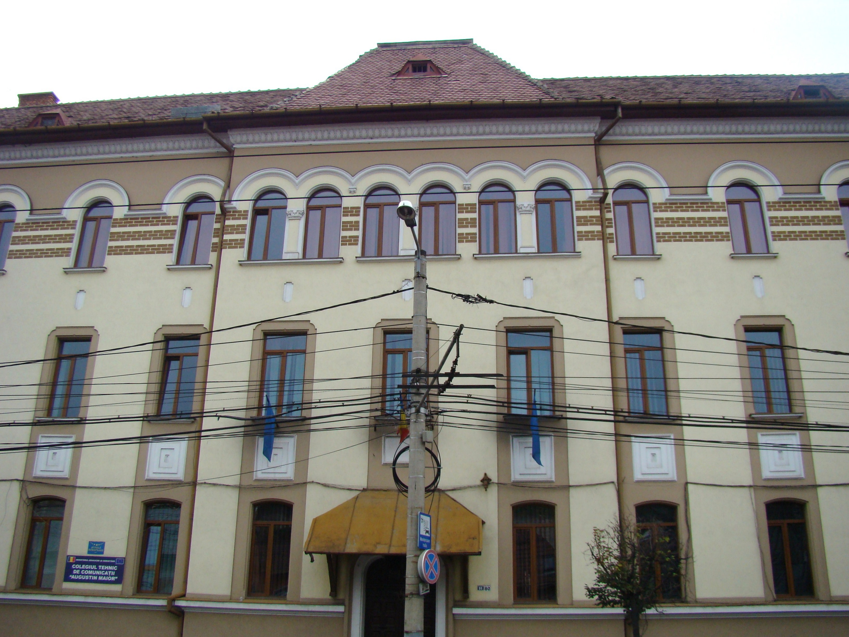 Clădire monument istoric, în prezent Colegiul tehnic de comunicații „Augustin Maior”